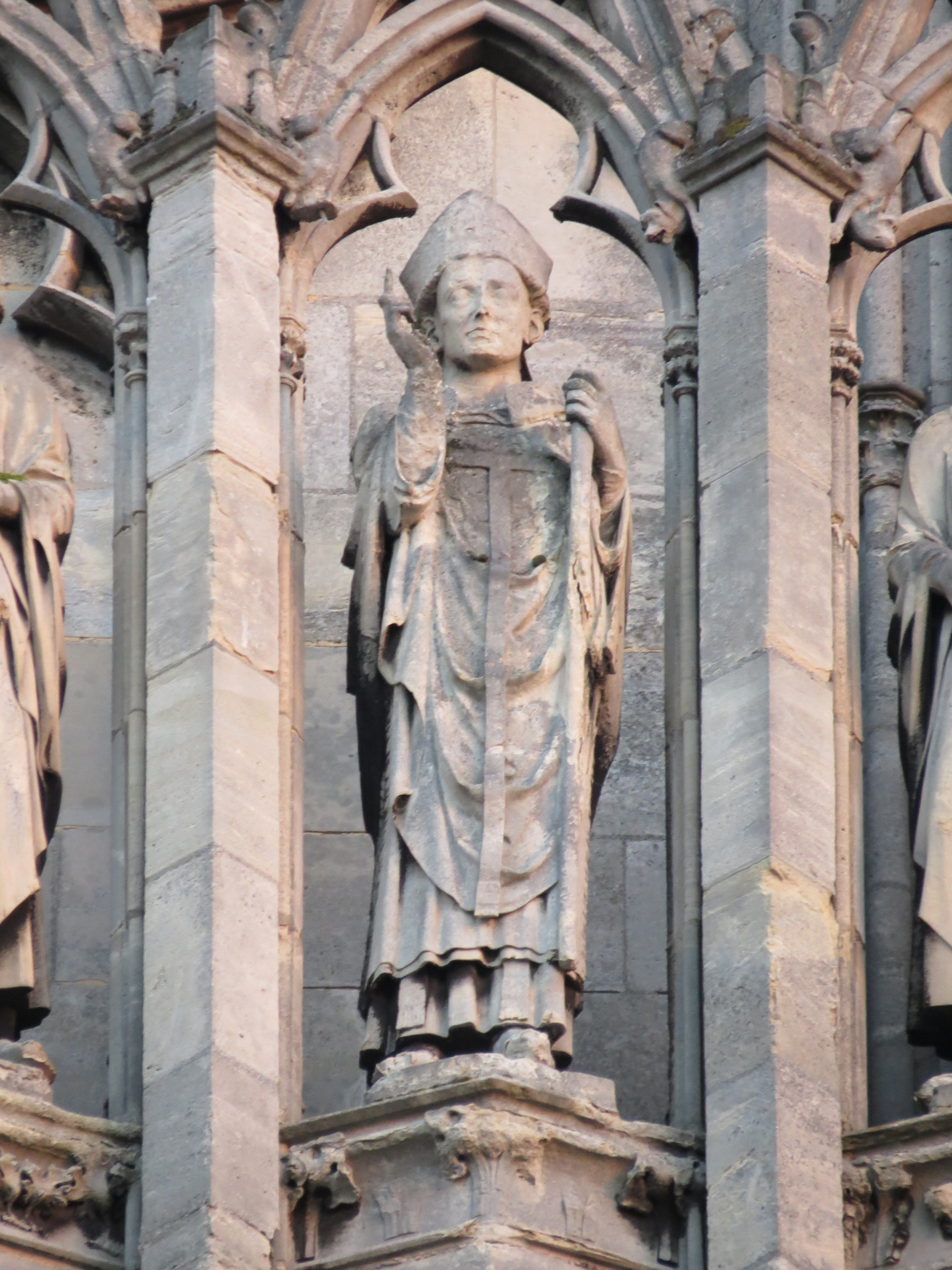 Statue de Maurille, archevêque de Rouen, 5e statue à droite de la galerie de la façade occidentale.